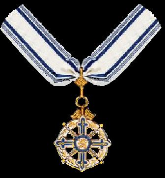 Eigen tekening